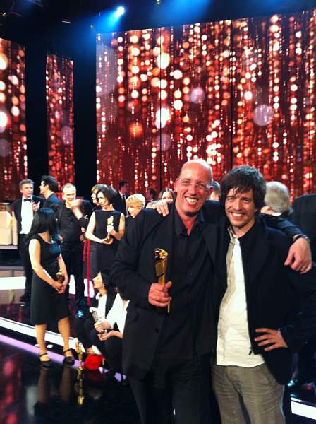 Regisseur Arne Birkenstock und Editor Felix Bach bei der Verleihung des Deutschen Filmpreises für ihren Film Chandani und ihr Elefant in Berlin